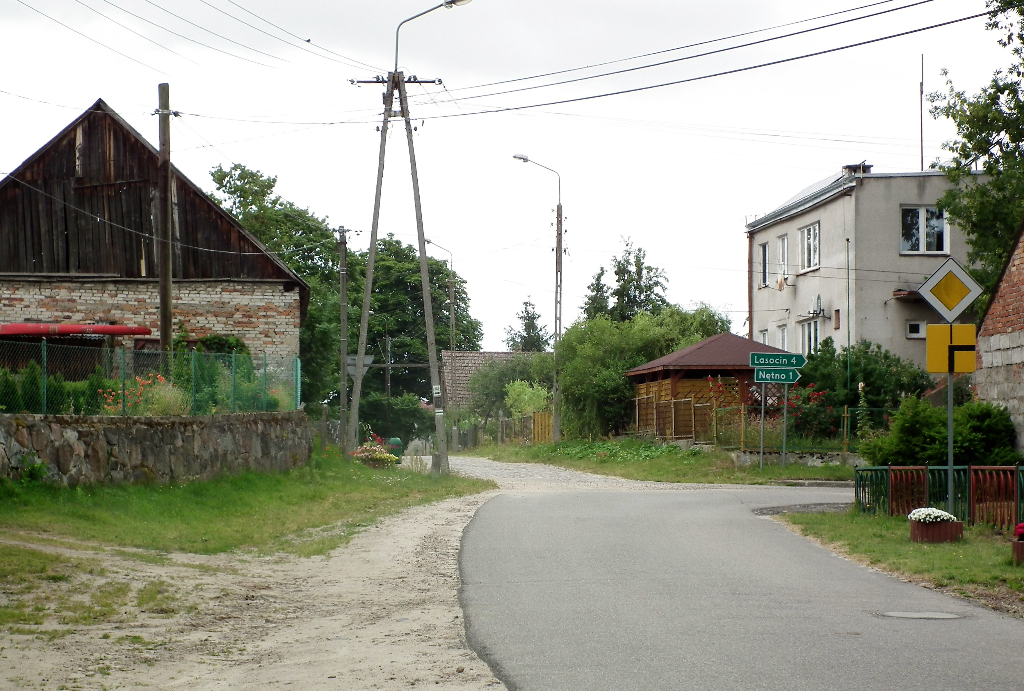 Rydzewo w Zachodniopomorskiem.